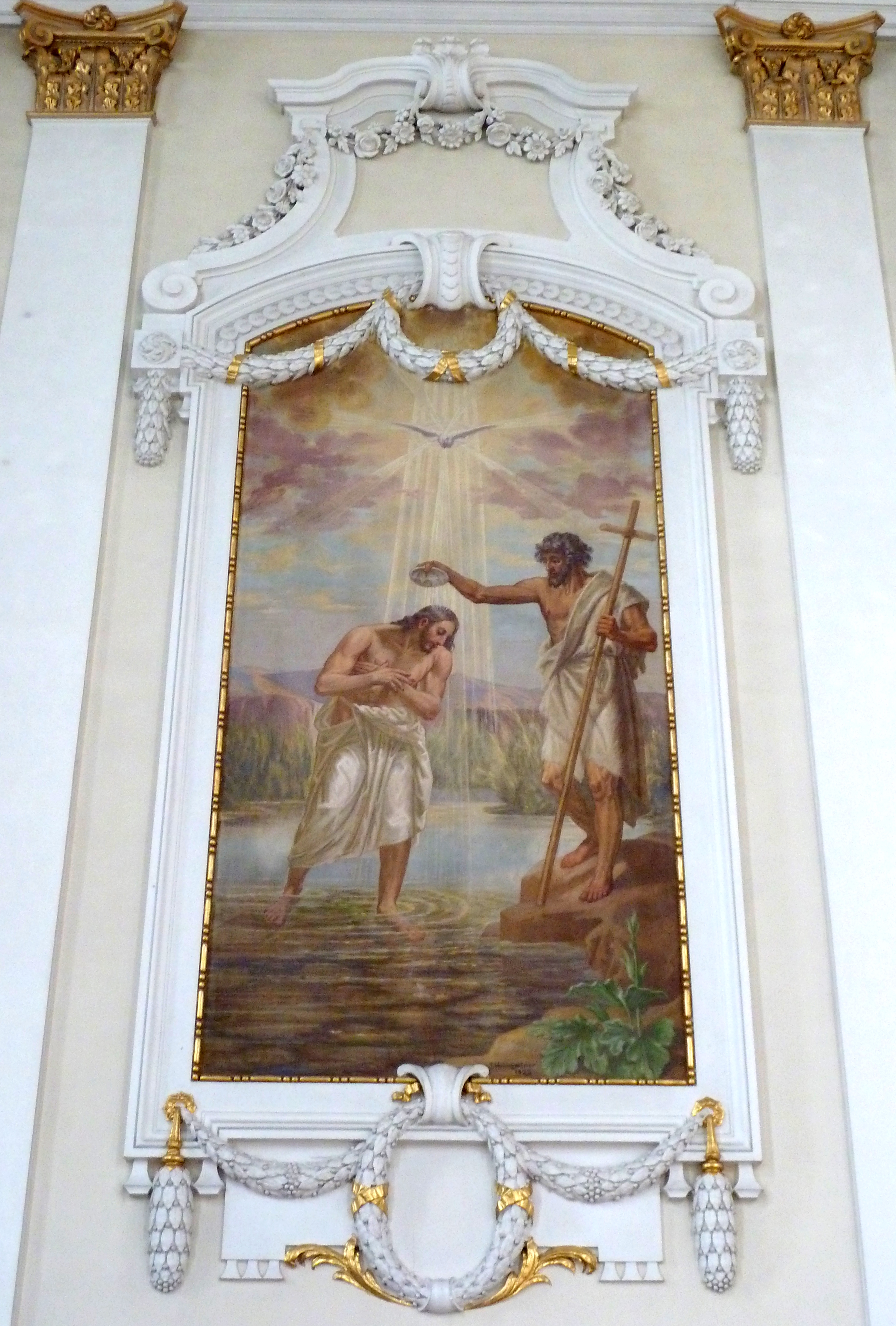 Jesu Christi Taufe im Jordan durch Johannes den Täufer. Fresko des Schweizer Malers Josef Christian Heimgartner aus 1920 an der südlichen Chorwand der katholischen Kirche St. Nikolaus von Altstätten, Kanton St. Gallen, Schweiz.